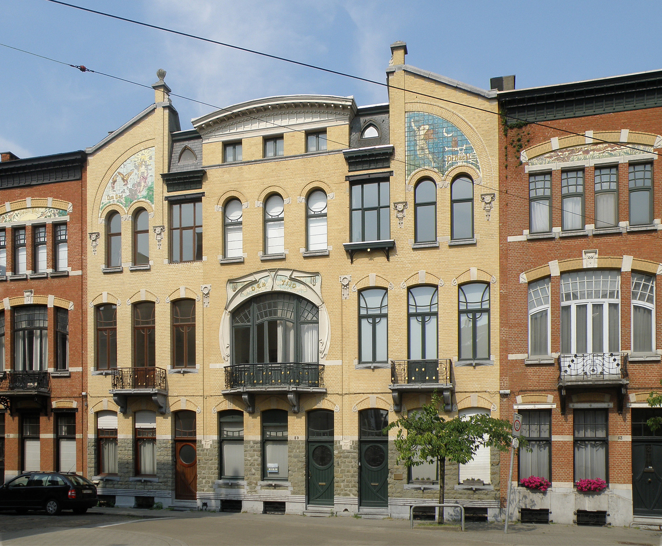 Anvers, Belgique. Ensemble symétrique de cinq maisons individuelles de style Art nouveau, dénommées, de gauche à droite, De Morgend (le Matin), Den Dag (le Jour), Den Tijd (le Temps), De Nacht (la Nuit), et Den Avond (le Soir), sises aux n° 55 à 63 de la Waterloostraat, dans le quartier Zurenborg. Création du duo d’architectes August Cols et Alfried Defever, 1903.